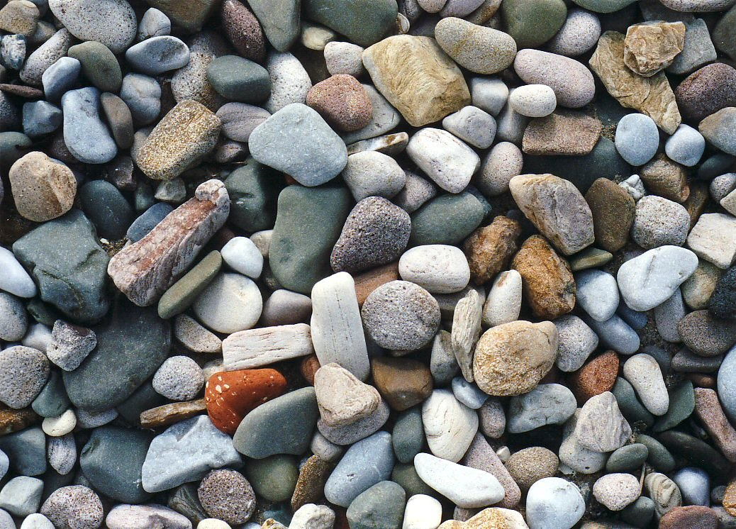 OblázkyBeach Stones 2